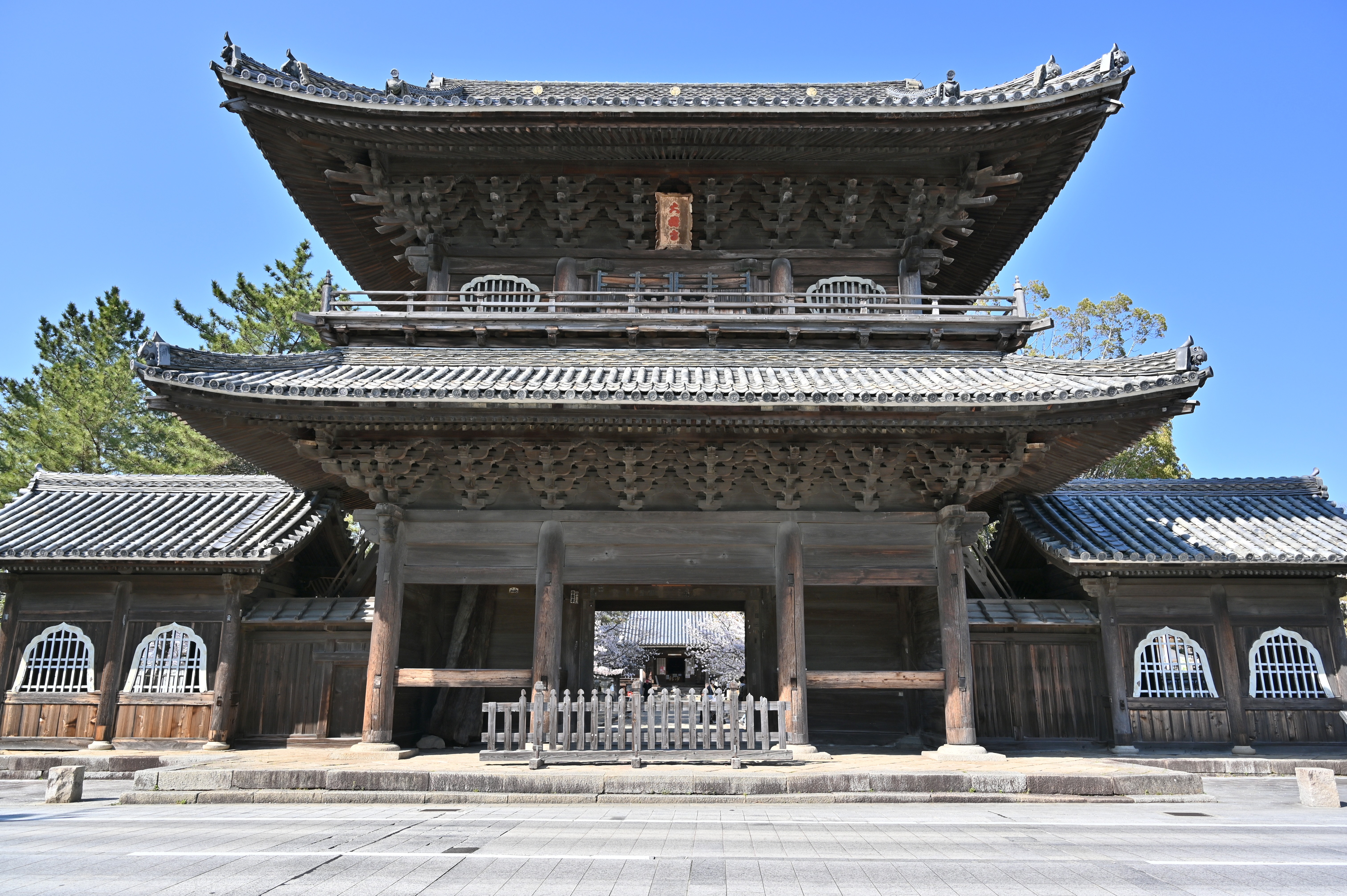 大樹寺三門